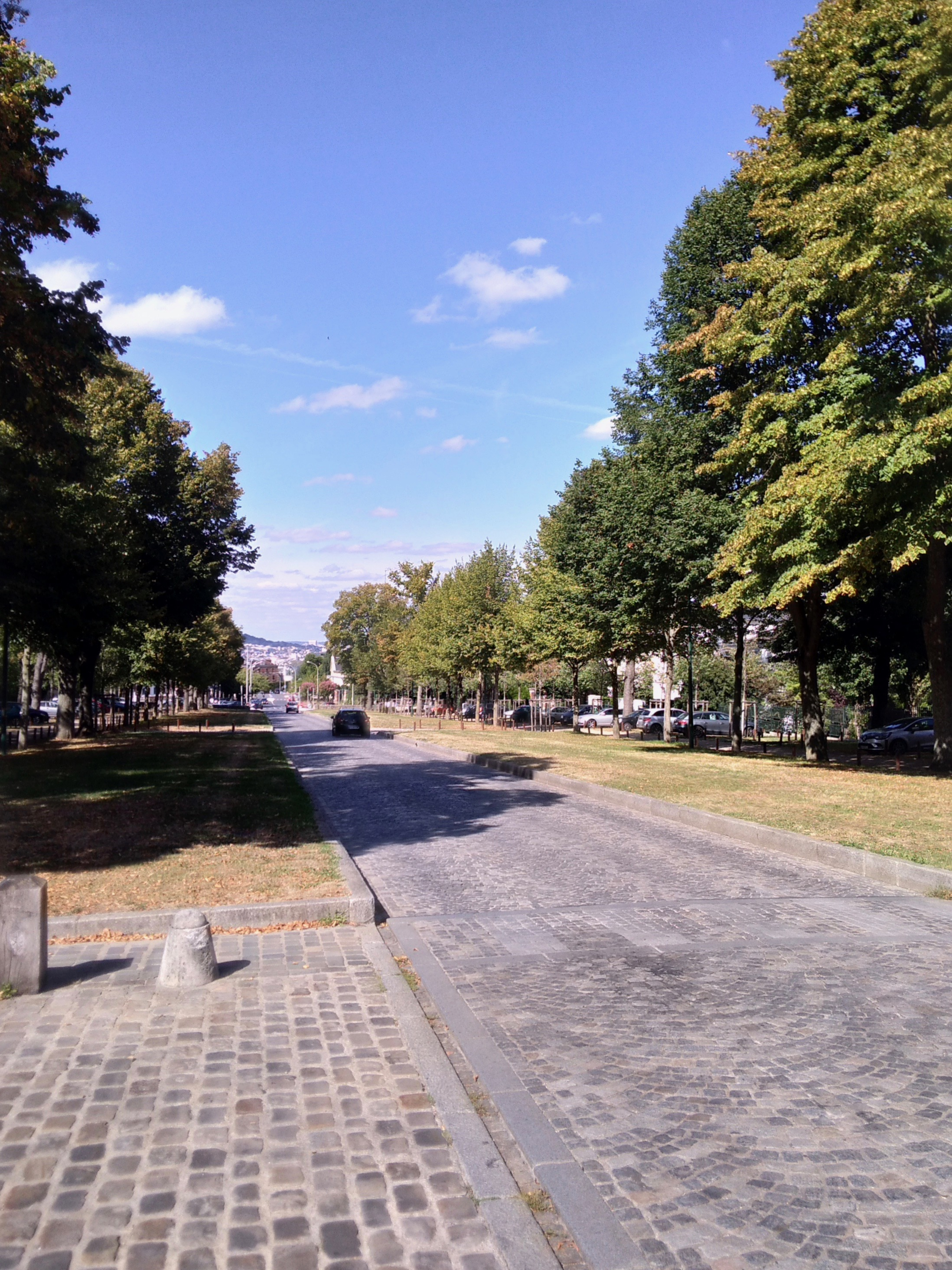 Vue de l'avenue du château à Meudon en septembre 2018